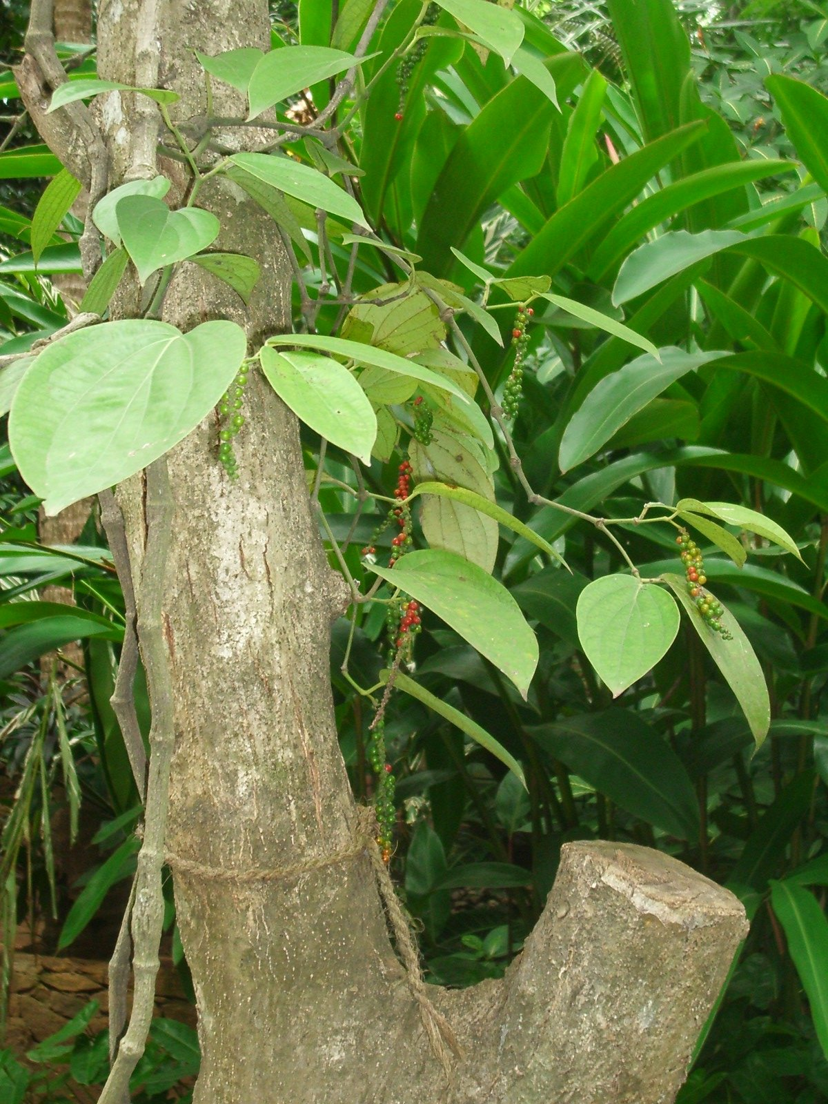 Especies, foto feta per J. Ollé el juliol del 2006